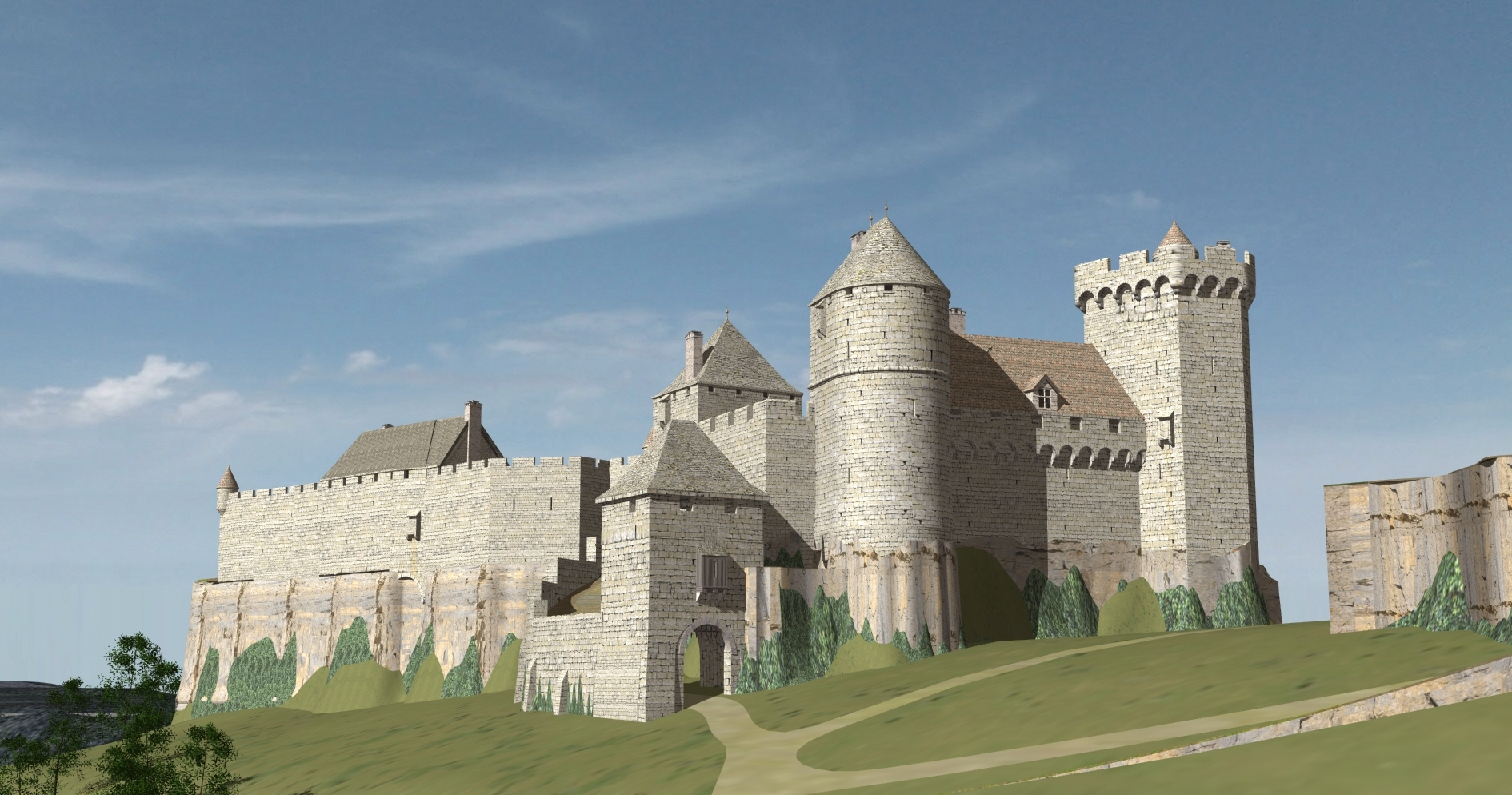 Mise à jour de restitution avec tour porte à l'angle nord-est.